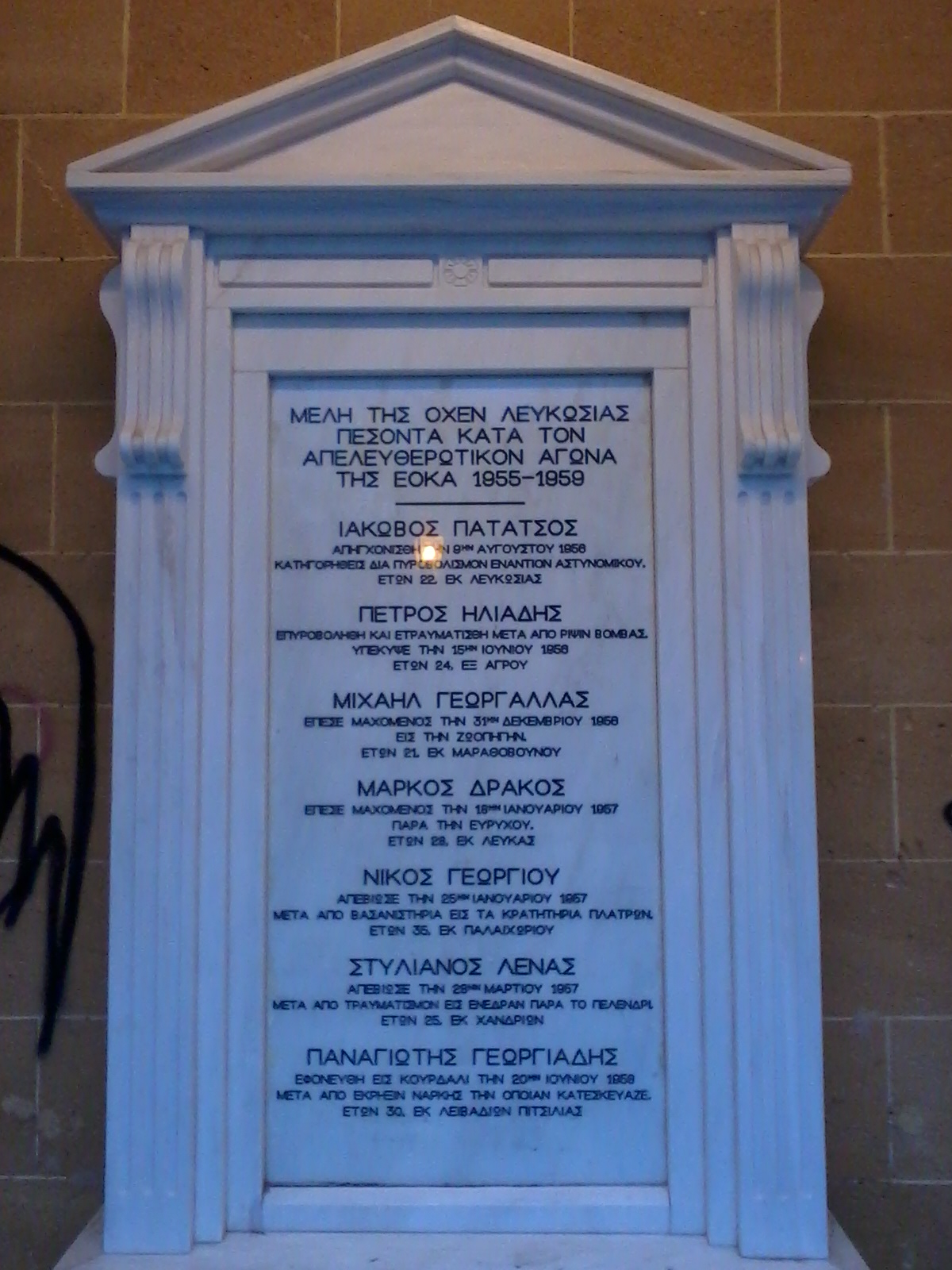 Μνημείο προς τιμήν των μελών της ΟΧΕΝ που σκοτώθηκαν κατά τη διάρκεια του Αγώνα της ΕΟΚΑ